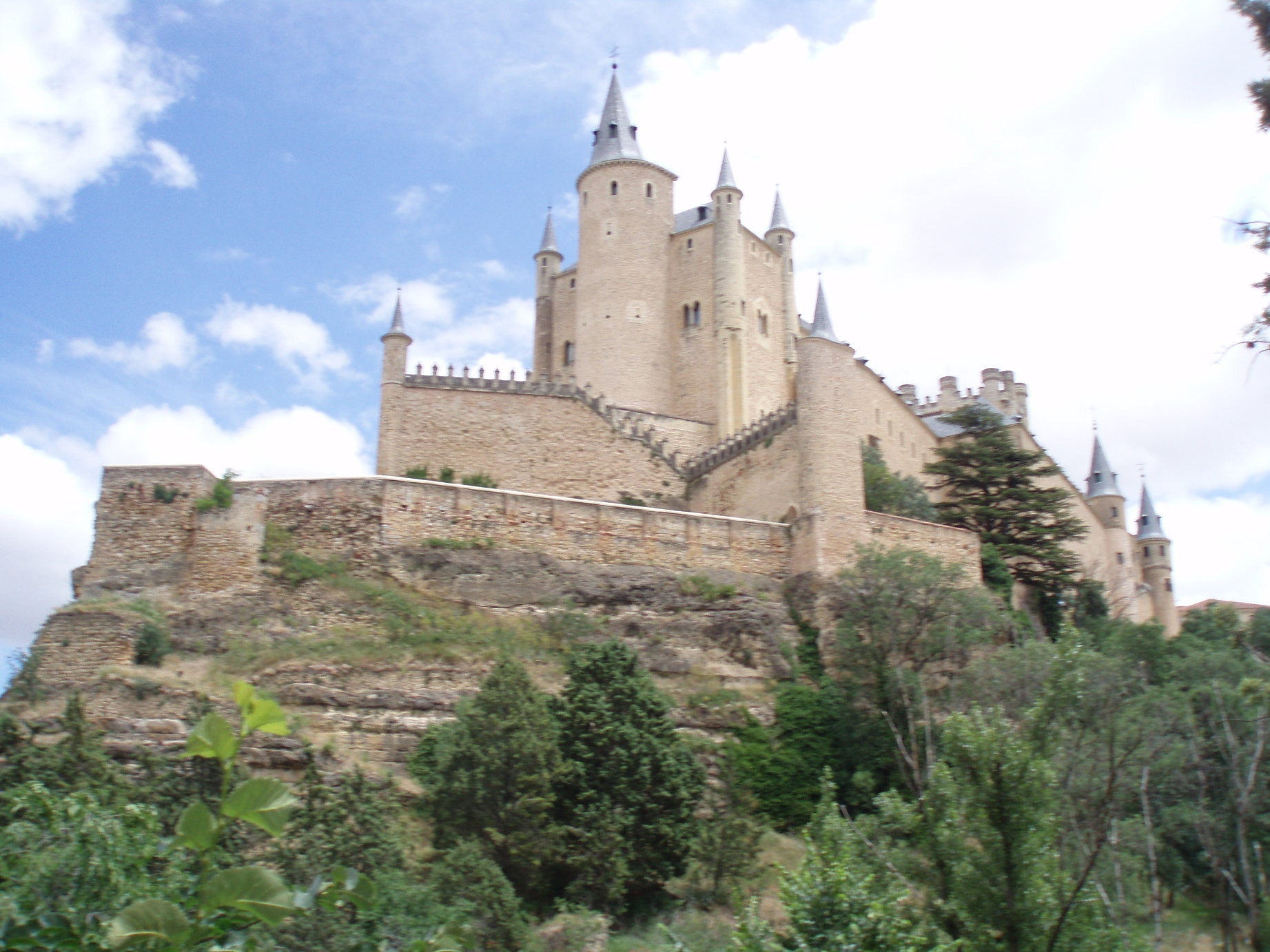 Vista frontal del Alcázar de Segovia (España).